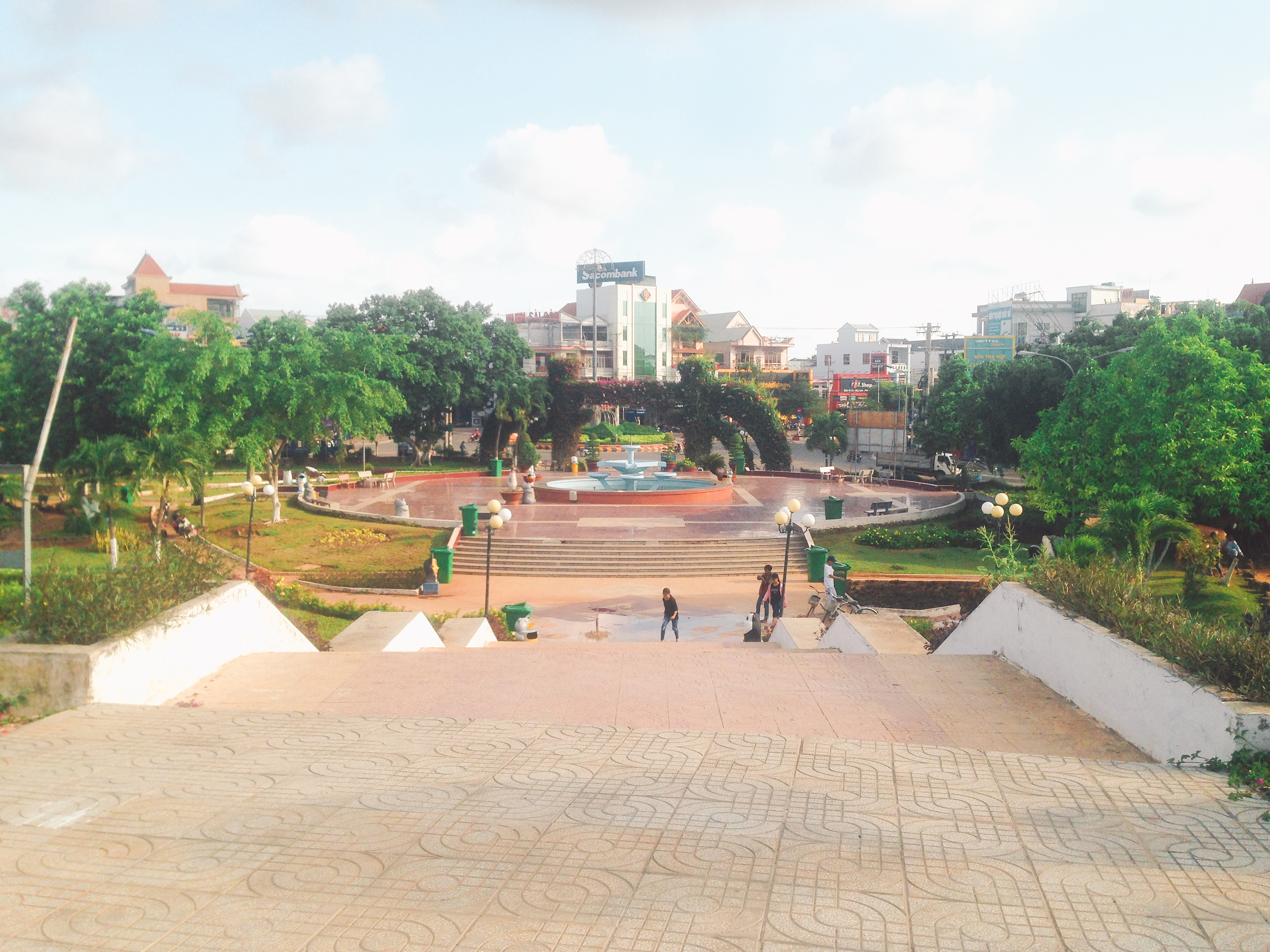 Thị trấn Phước Bửu, Xuyên Mộc